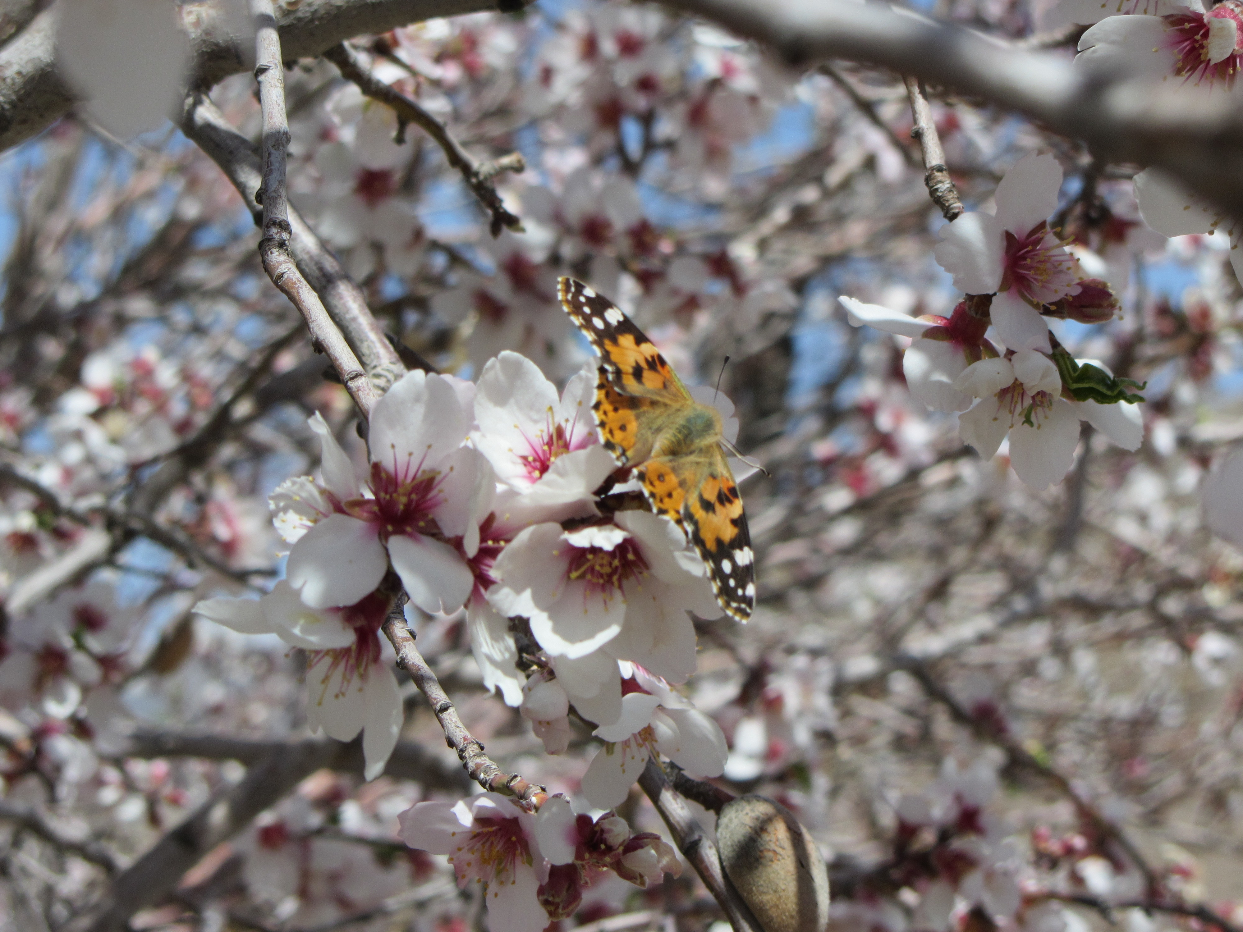 نگاره‌ای از شکوفه‌ی بادام در نوروز ۱۳۹۲ در روستای عطرافشان استان اصفهان. پروانه‌ای روی شکوفه نشسته است.